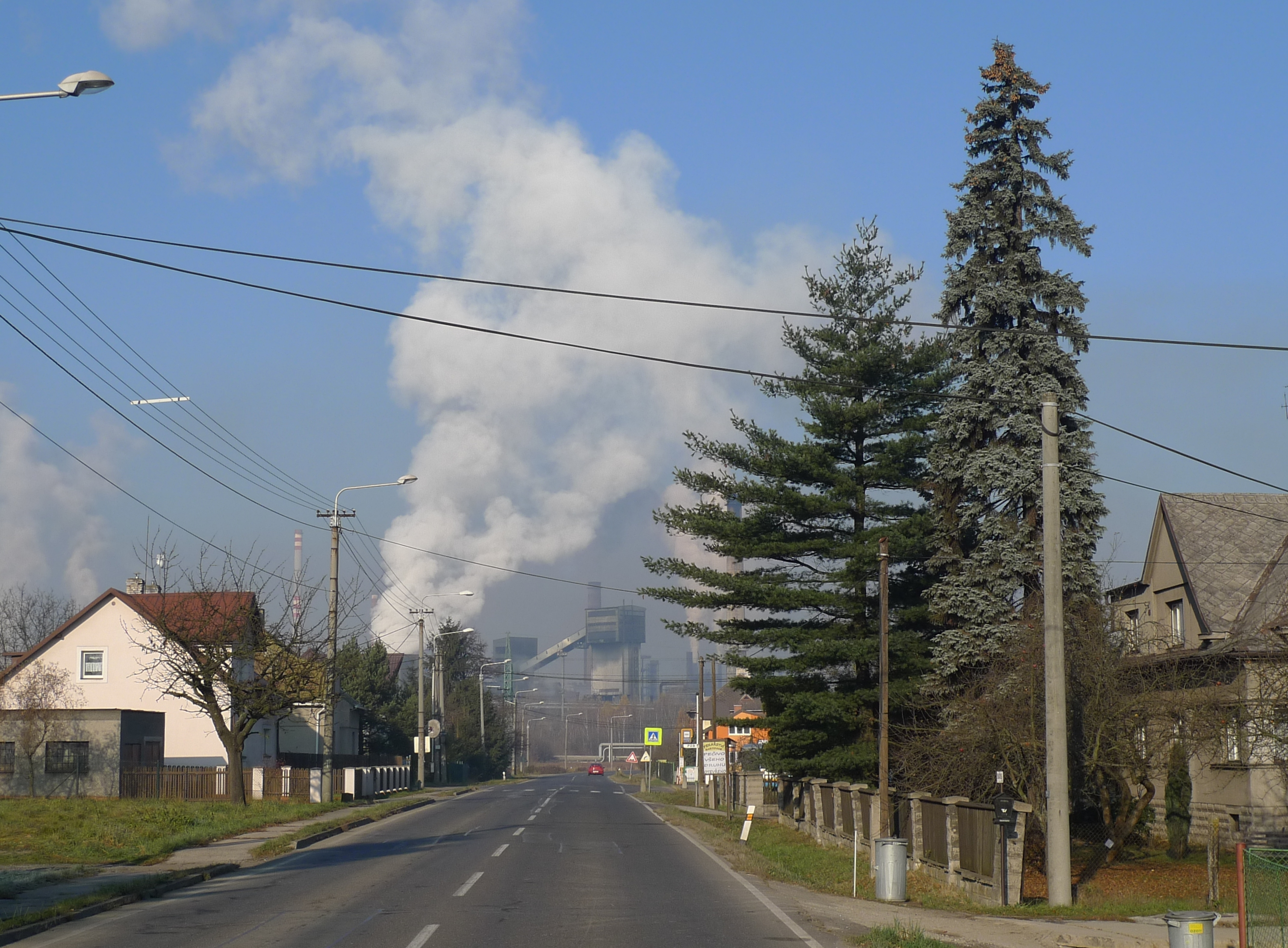 Bartovice - Šenovská ul a Mittal Steel